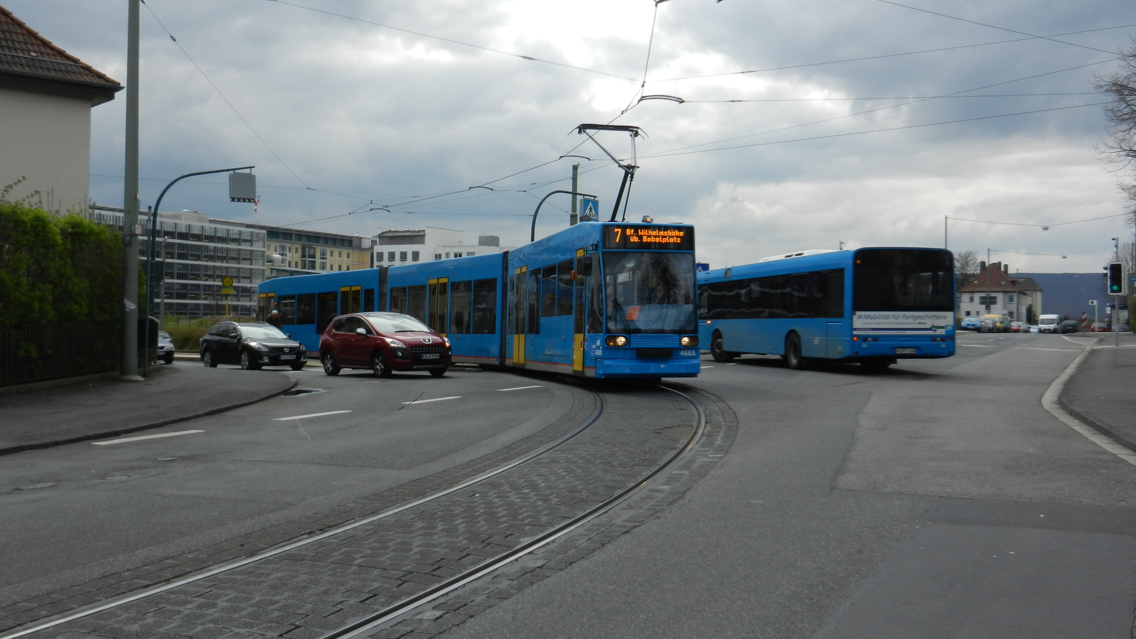 NGT6C TW 468 bei der Ausfahrt aus der Haltestelle Simmershäuser Straße